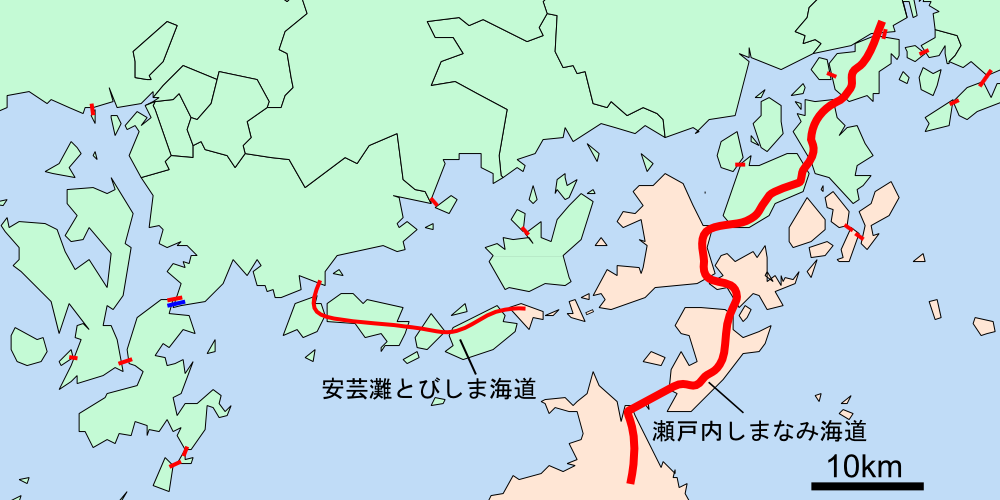 芸予諸島における架橋状況